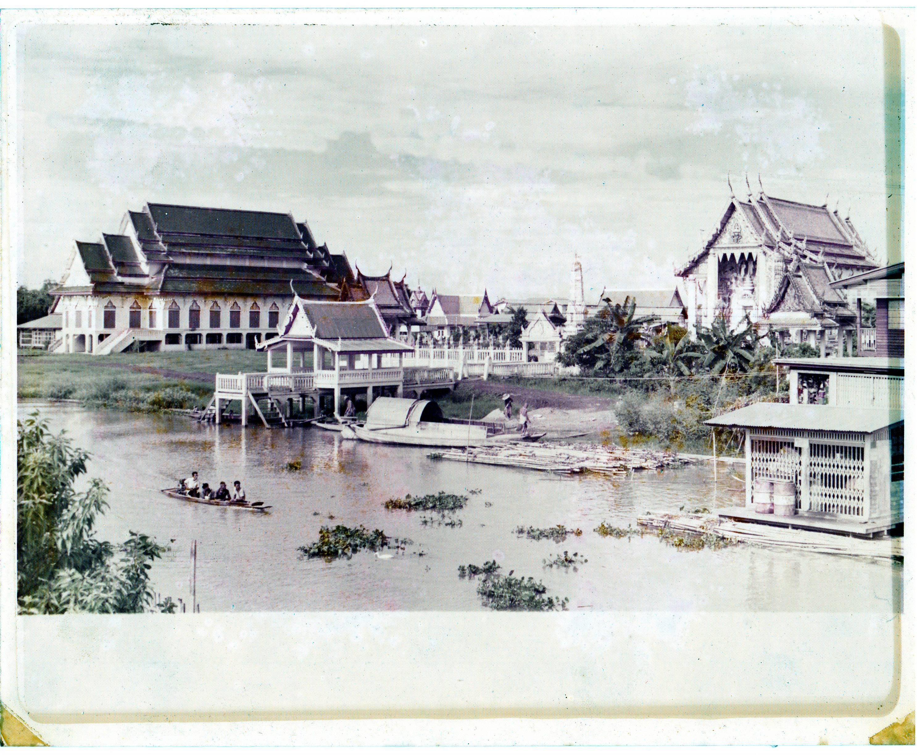 ภาพสมัย พ.ศ. ๒๕๐๐